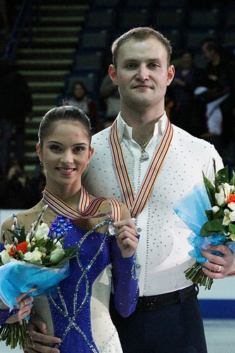 Вера Базарова и Юрий Ларионов с серебряными медалями чемпионата Европы по фигурному катанию 2012